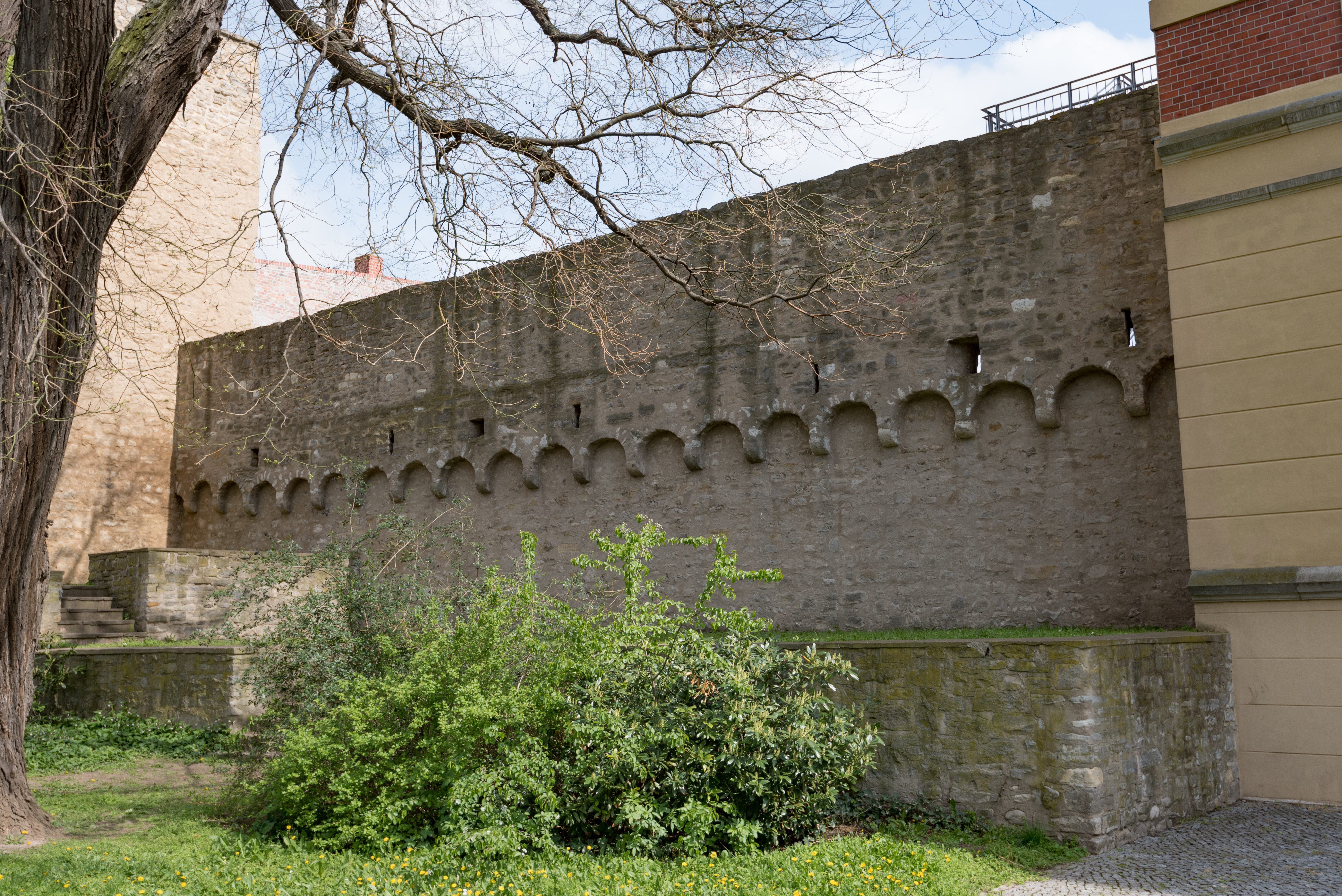 Aschersleben, Stadtbefestigung, Mauer in der Luisenpromenade